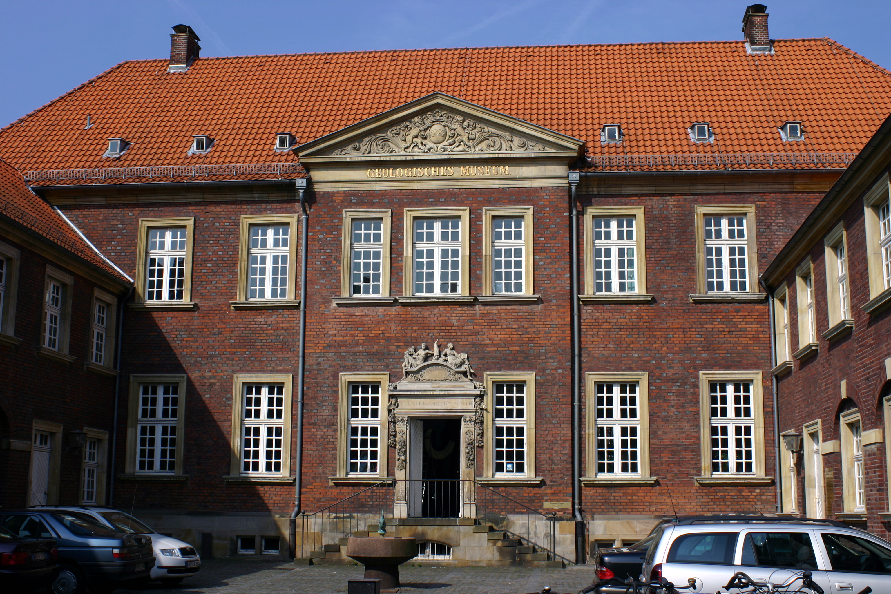 Geologisch-Paläontologisches Museum der Universität Münster